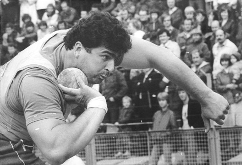 Udo Beyer ADN-ZB Ludwig 29.5.83-St.-Erfurt: Bei der Leichtathletik-WM-Qualifikation im Erfurter Georgi-Dimitroff-Stadion bedachten die Zuschauer die Leistungen der besten Kugelstoßer der Republik mit viel Beifall. Weltrekordler Udo Beyer erzielte mit 21,65 m die bisher größte Weite im Kugelstoßen in diesem Jahr in der Welt. Abgebildete Personen: Beyer, Udo: Kugelstoßer, DDR